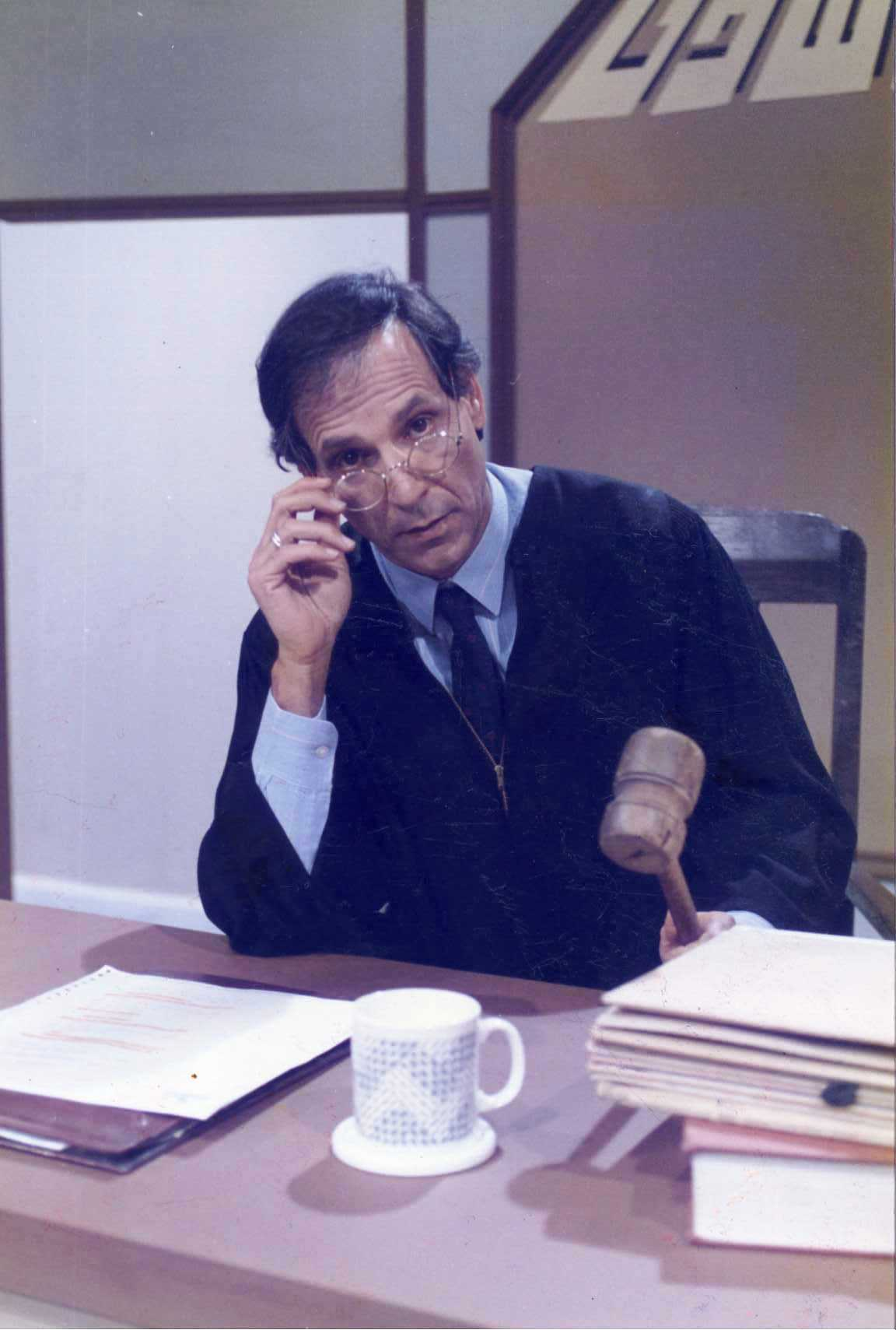 בלי סודות הייתה תוכנית טלוויזיה לימודית, אשר שודרה בטלוויזיה החינוכית הישראלית באמצע שנות השמונים, בהמשך בגלל הפופולריות הגדולה נוצרה תוכנית המשך, "בסוד העניינים", אשר הופקה בשנים 1991-1992.